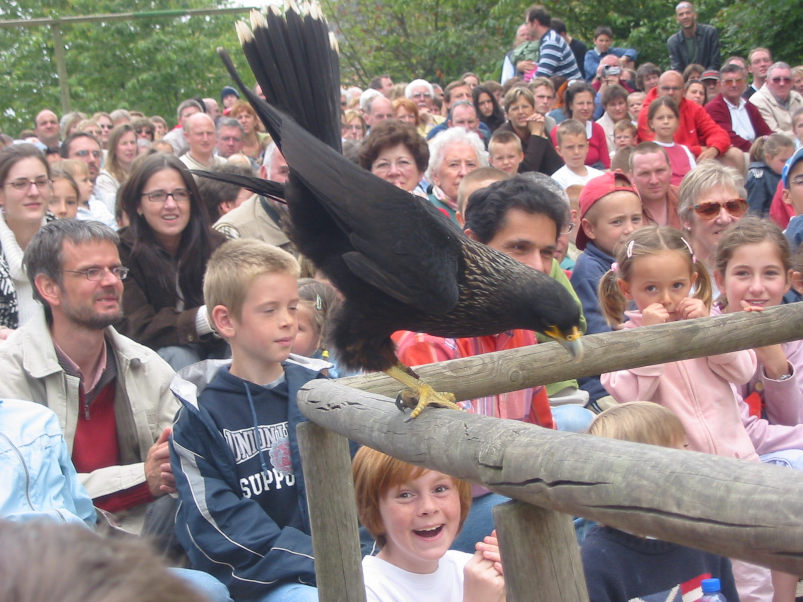 Belgium, Pairi Daiza